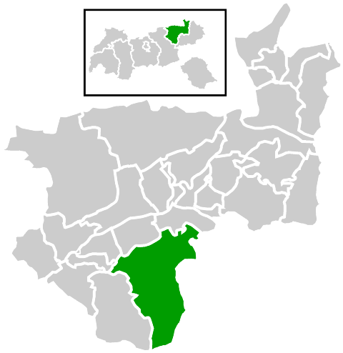 Lage der Gemeinde innerhalb des Bezirks Kufstein